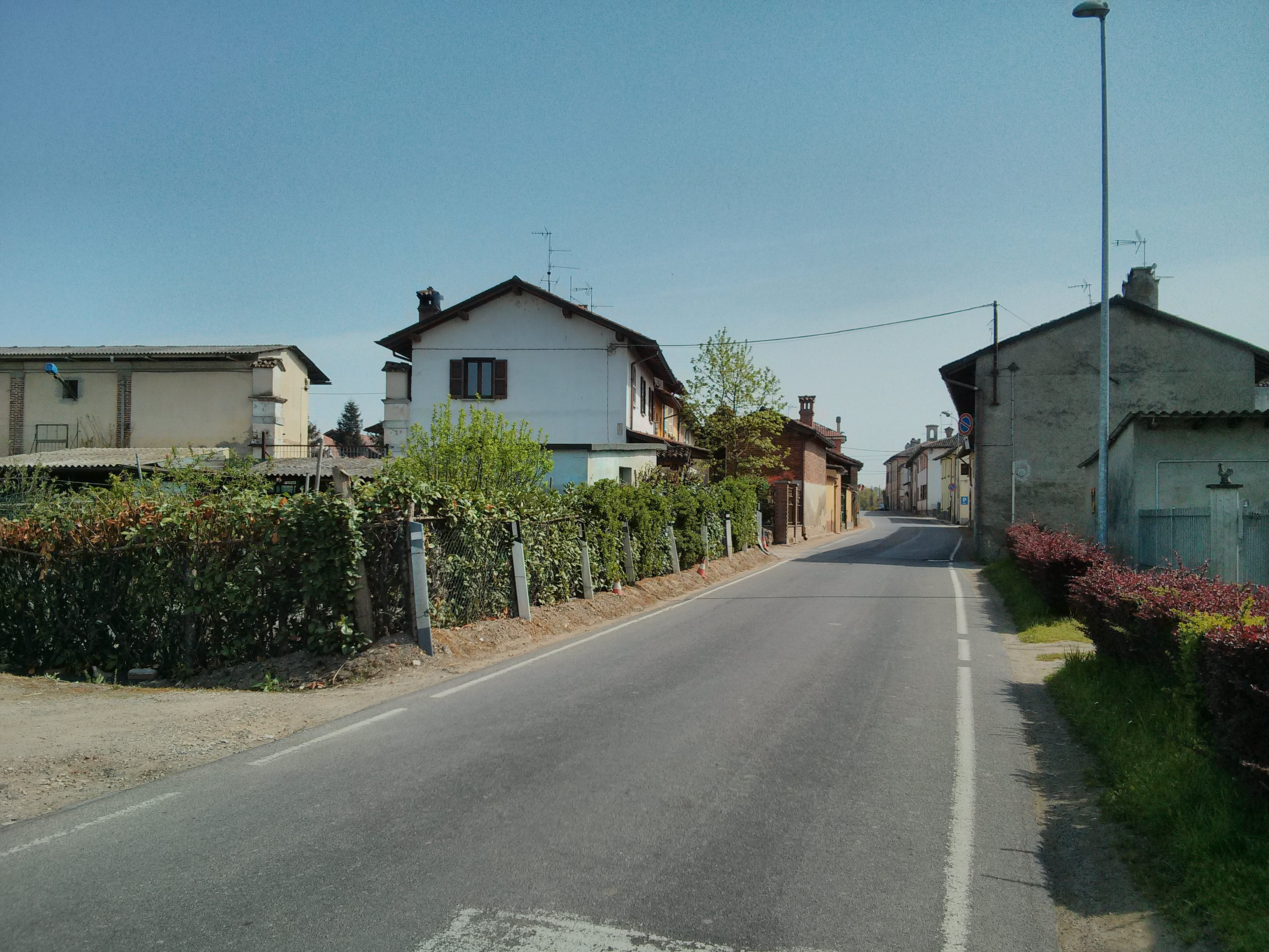 La frazione Ospedaletto del Comune di Linarolo. Sulla via francigena provenendo da San Leonardo